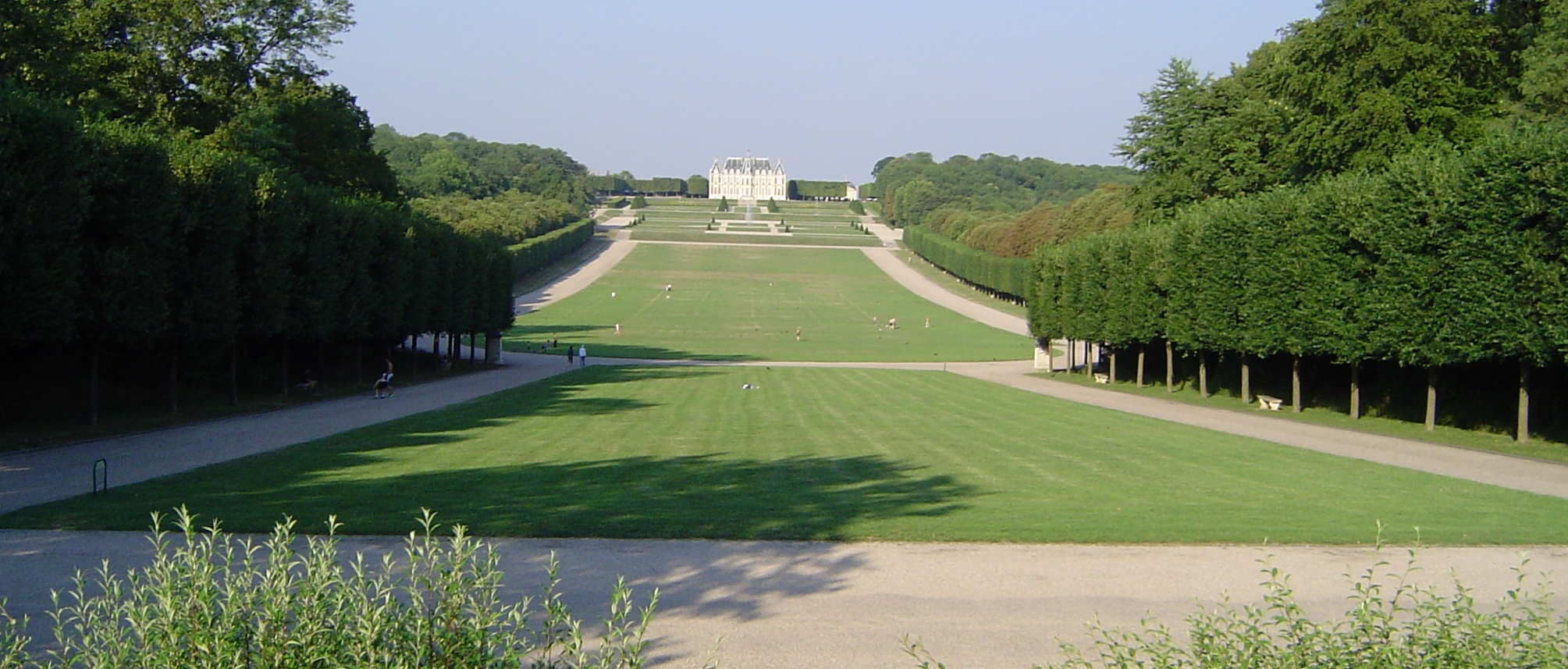 Plaine des quatre statues, Parc de Sceaux (vue prise coté Chatenay), Hauts-de-Seine, France.